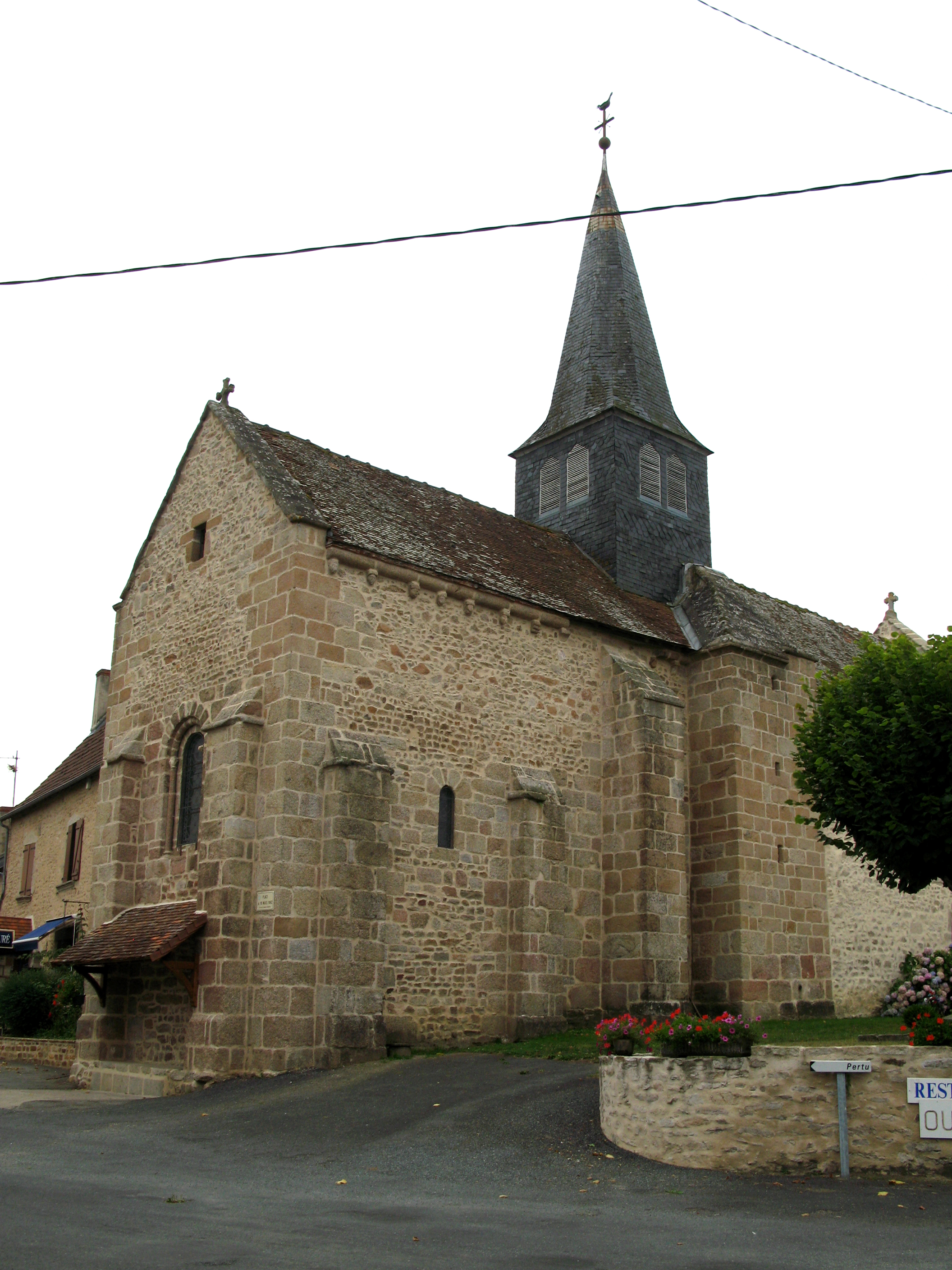 Colondannes (Creuse, France) - L'église. . .